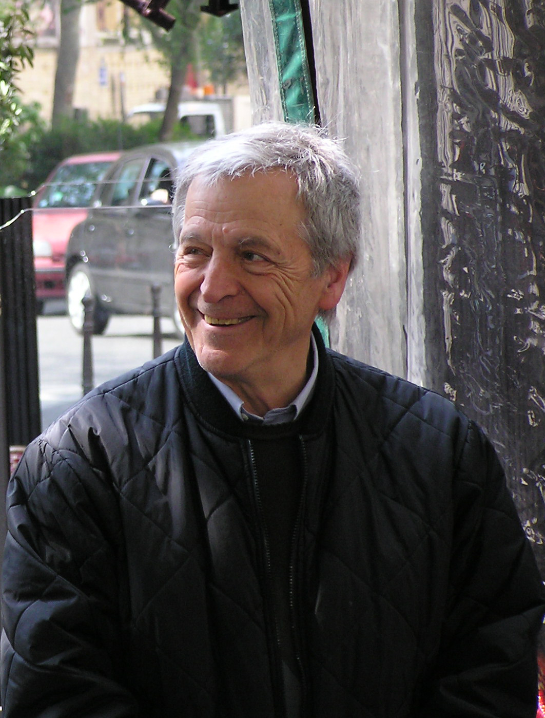 Costa-Gavras, au cours du tournage, à Paris, du film Eden à l'Ouest, le 22 avril 2008